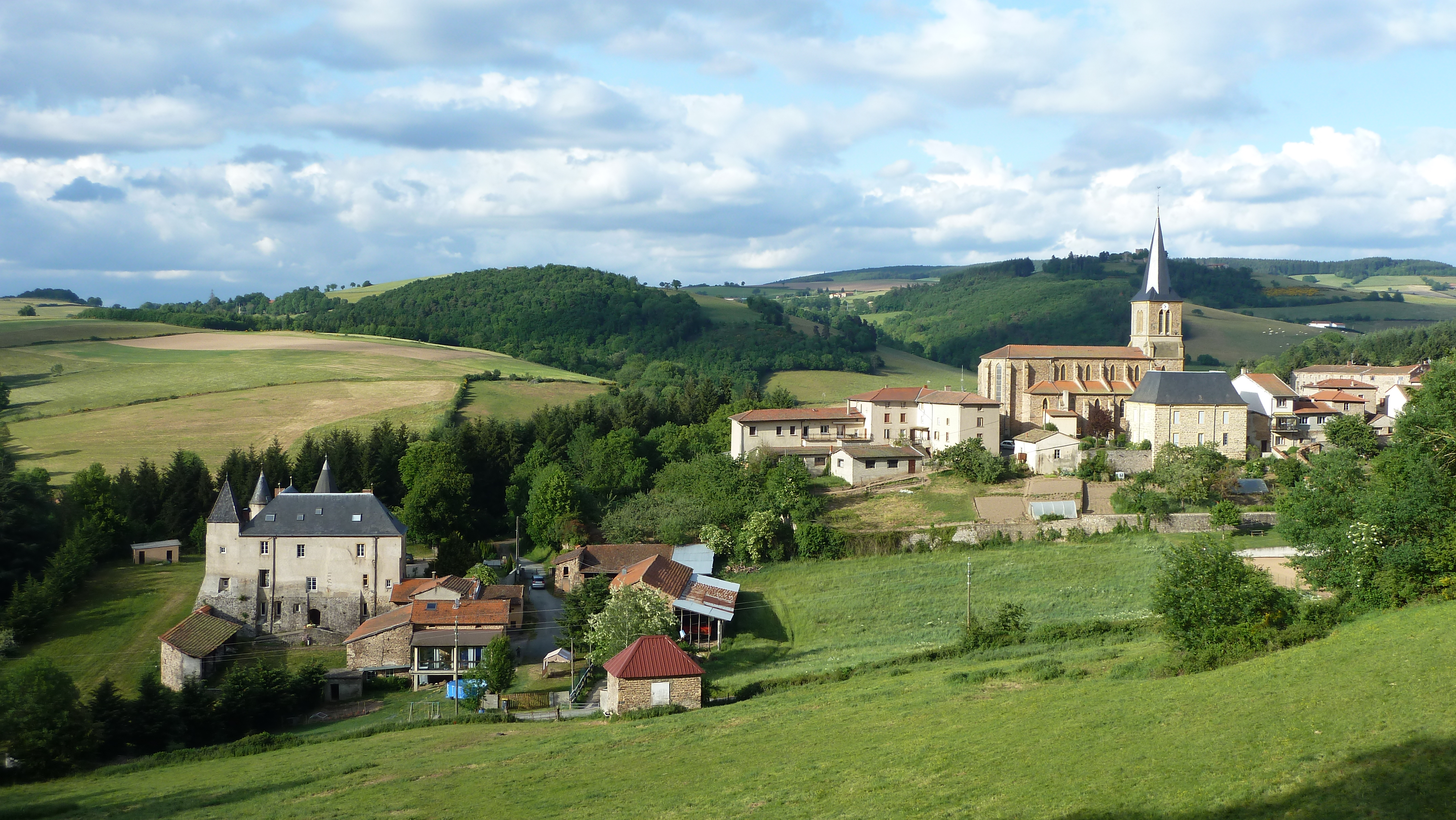 Vue sur l'église et le château de Sainte-Colombe-sur-Gand (Loire)